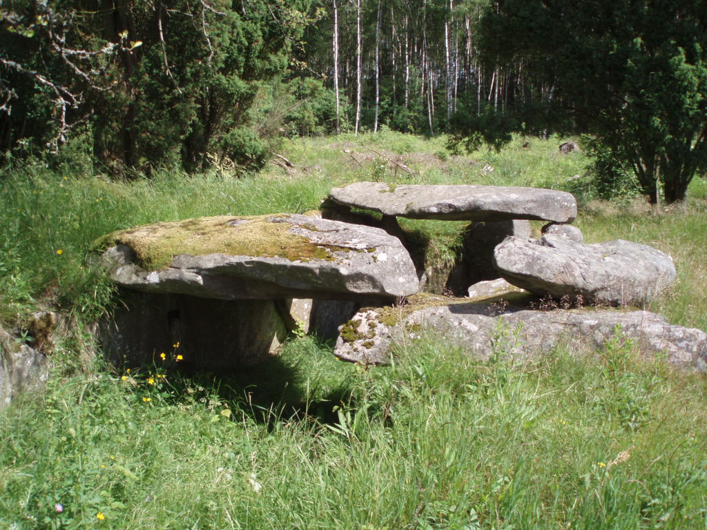 Tolarpsgånggriften, Halmstads kommun, Halland, Sverige.